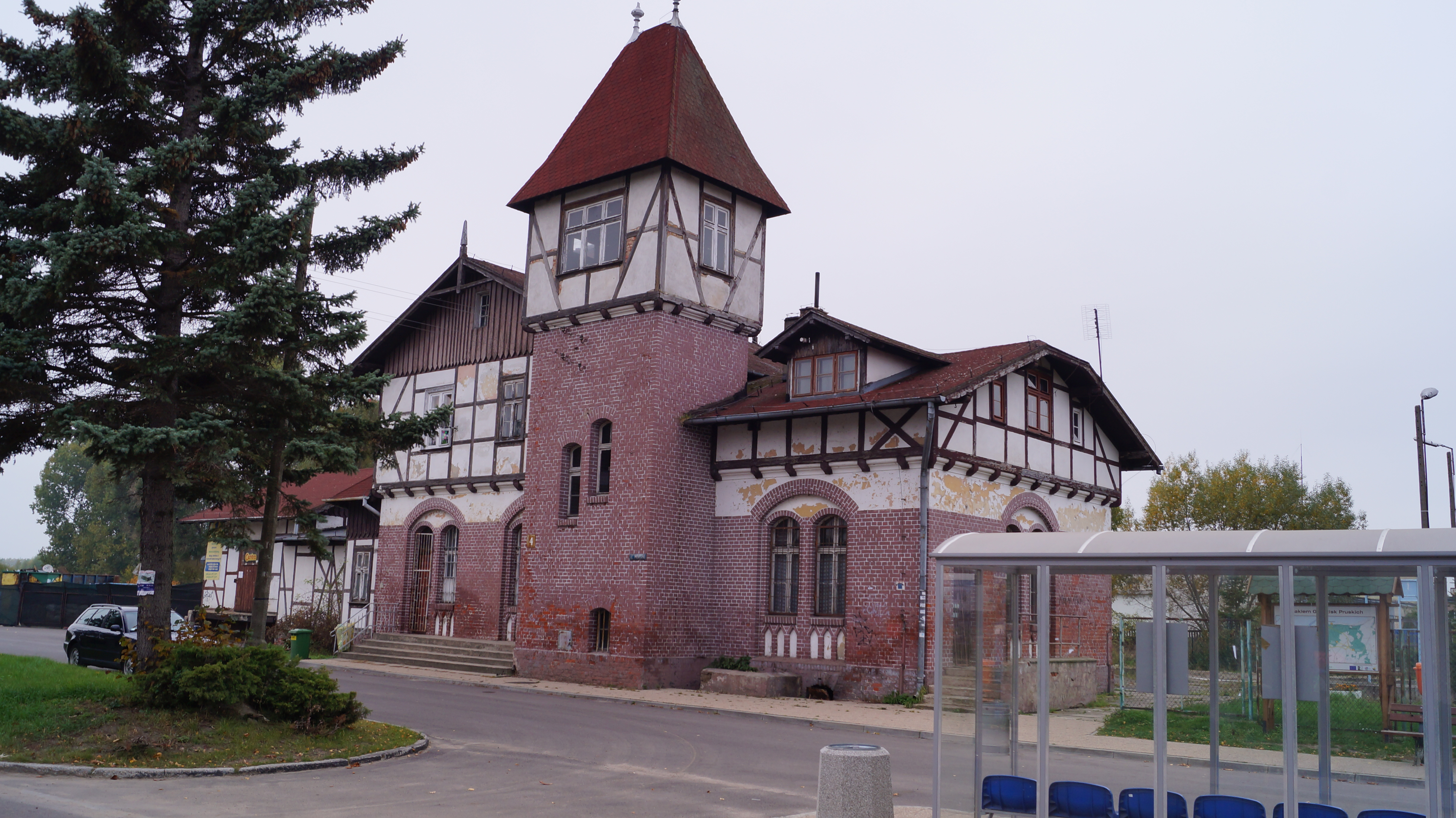 Tolkmicko, dworzec PKP, 1867